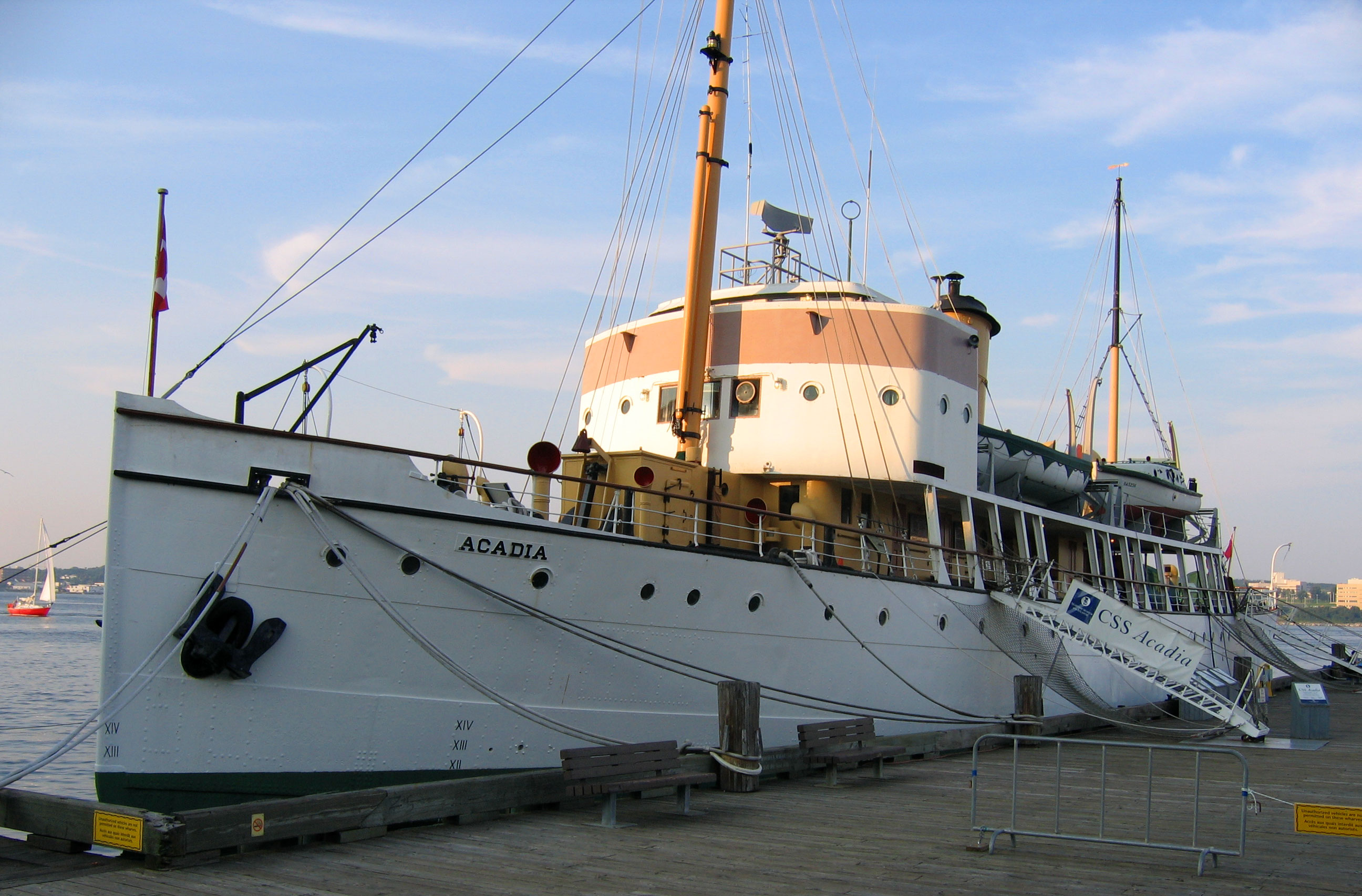 CSS Acadia, Halifax, Nova Scotia, Canada